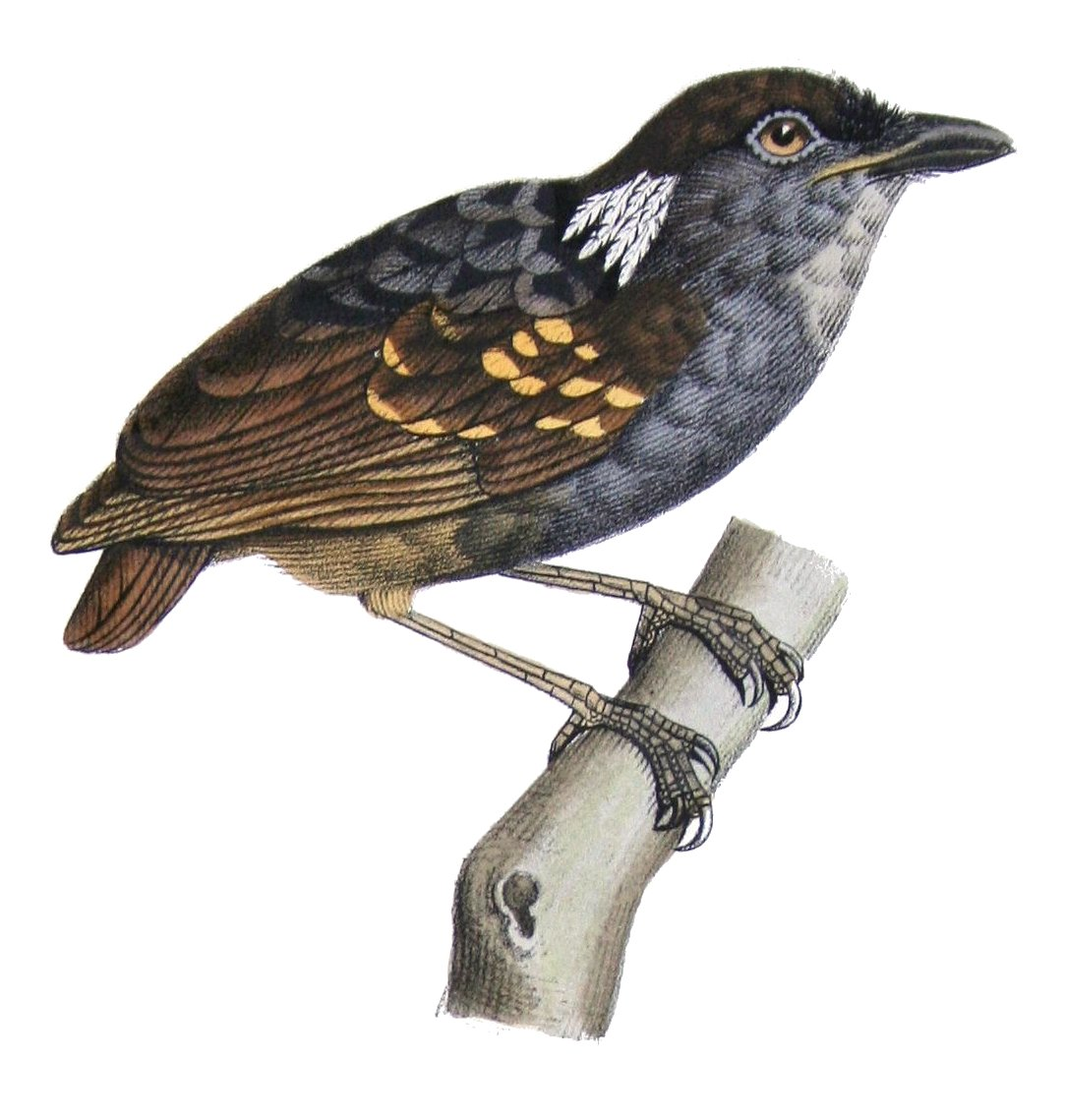 Conopophaga peruviana O. Des M. & De Cast. = Conopophaga peruviana Des Murs, 1856